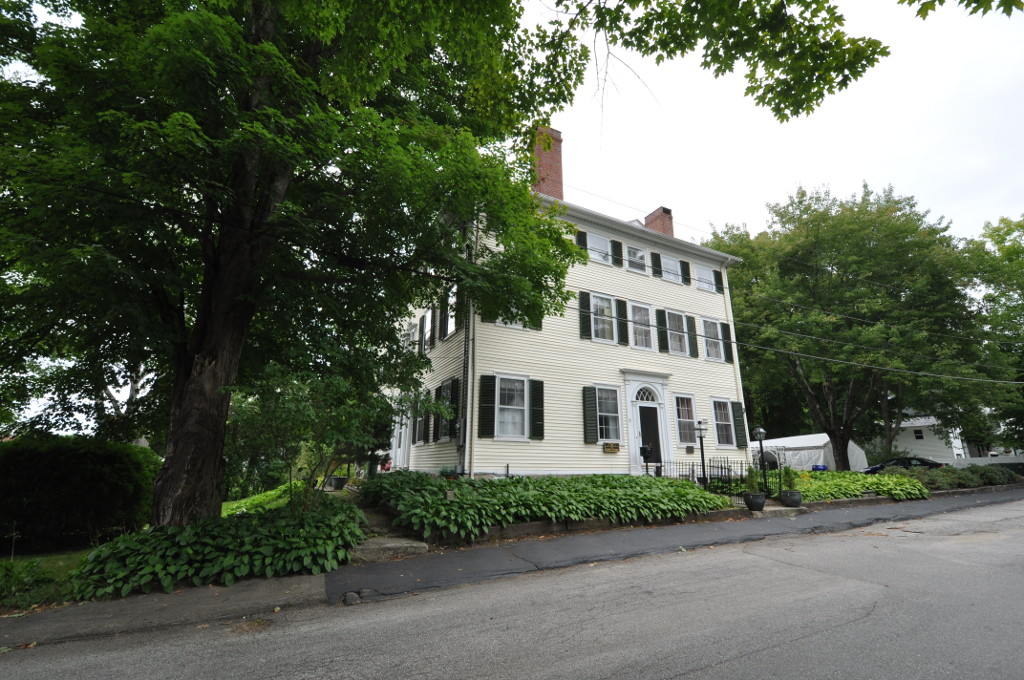 Bourne Mansion, Kennebunk, Maine.